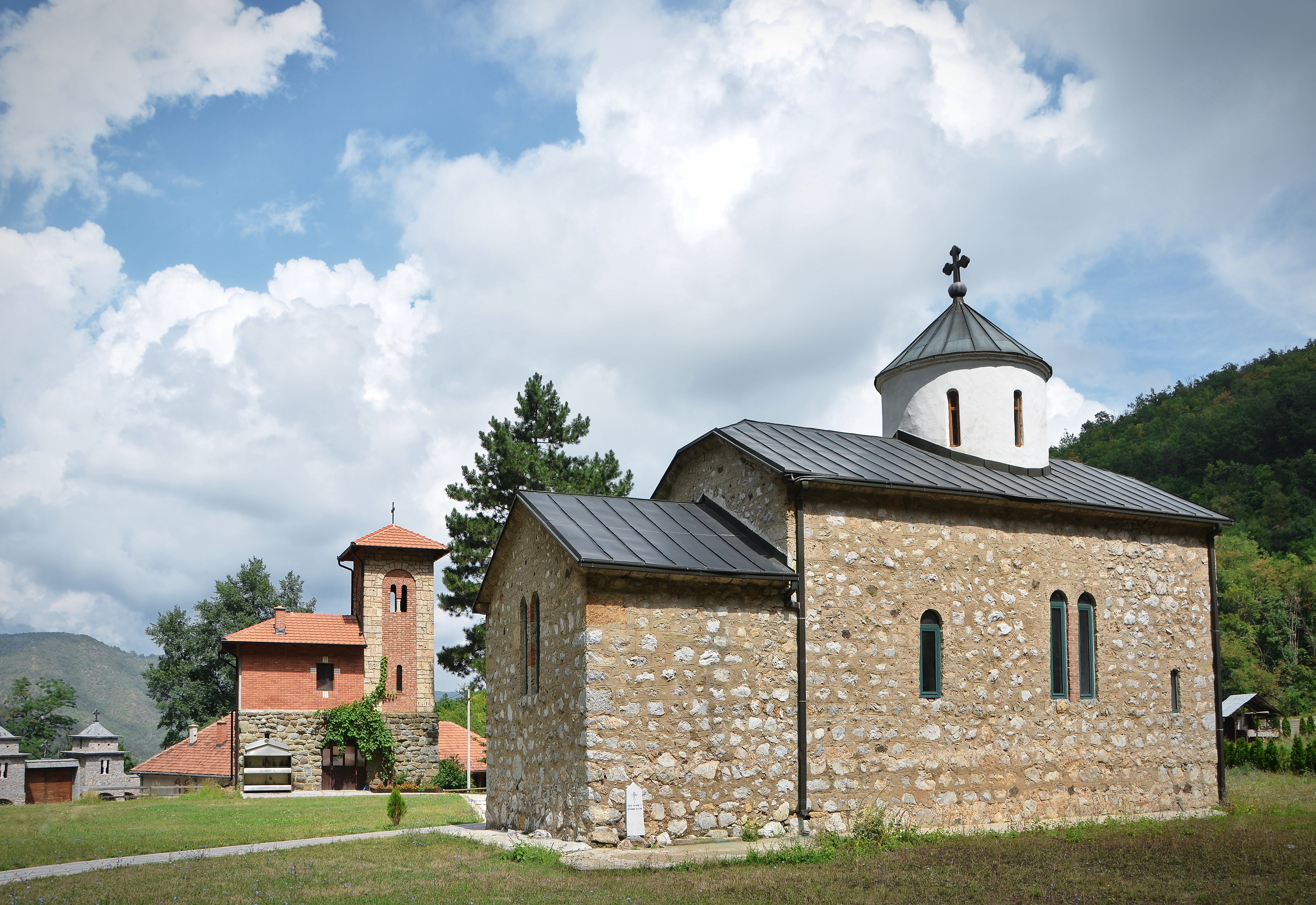 Манастирски комплекс недавно је уређен, а на улазу у порту доминира монументална улазна капија, конципирана по узору на средњовековна утврђења.